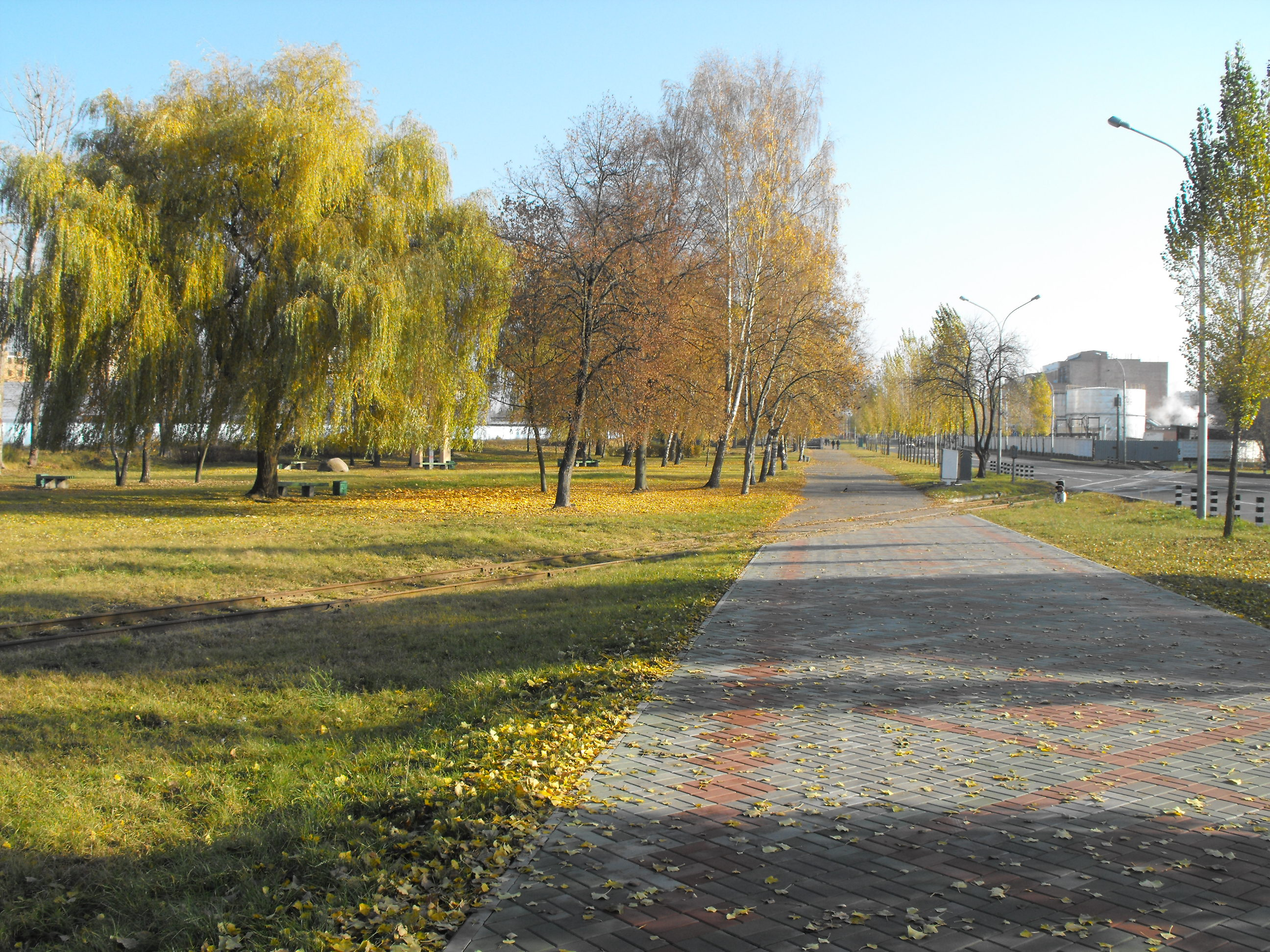 Место на улице Машерова около брестской ТЭЦ (справа от Брестского железнодорожного музея), через которое проходит железнодорожный путь, откуда в годы Второй мировой войны нацисты и полицаи отправляли евреев Брестского гетто в товарных вагонах к Бронной горе для убийства. Планируется установить мемориальный камень.